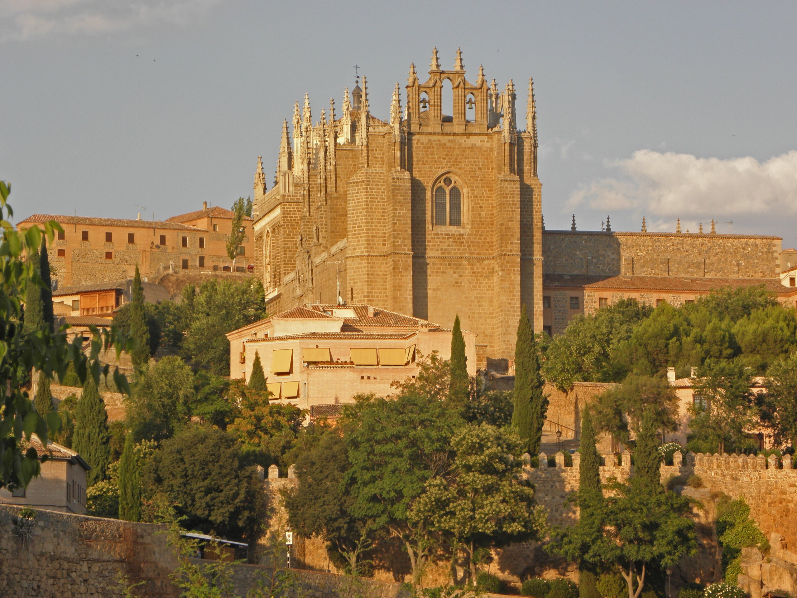 Esta foto participa en el juego En otro lugar de Flickr. Si no perteneces al grupo, no contestes, por favor. Si quieres contestar, únete